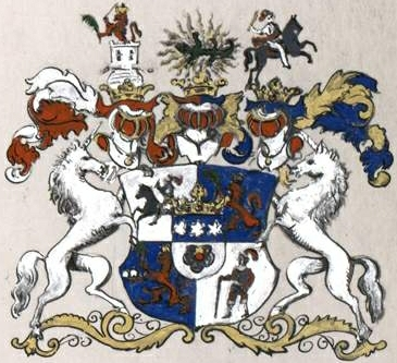 Douglase suguvõsa krahvivapp